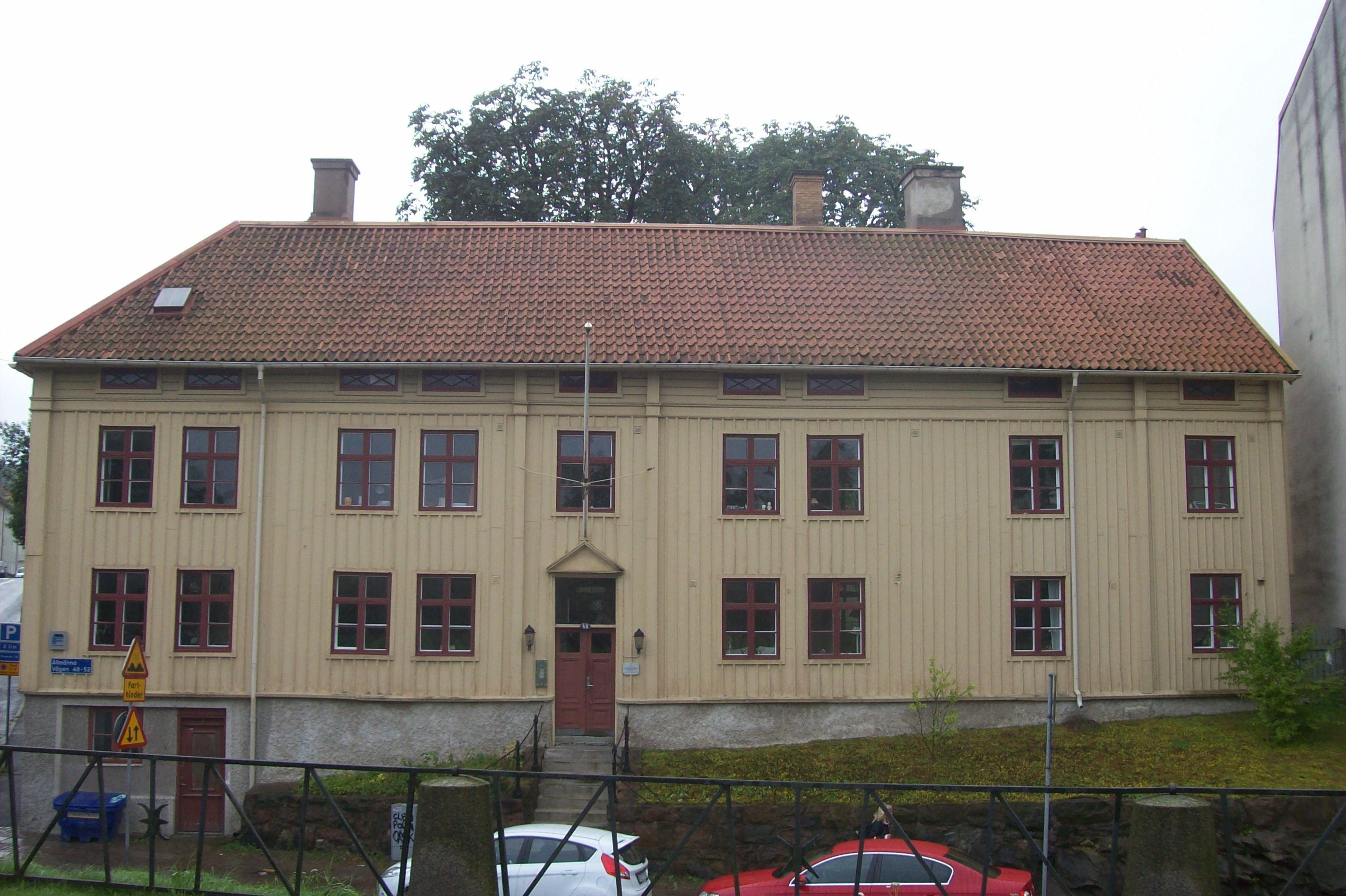 Olssonska Gården, Allmänna vägen Majorna Göteborg